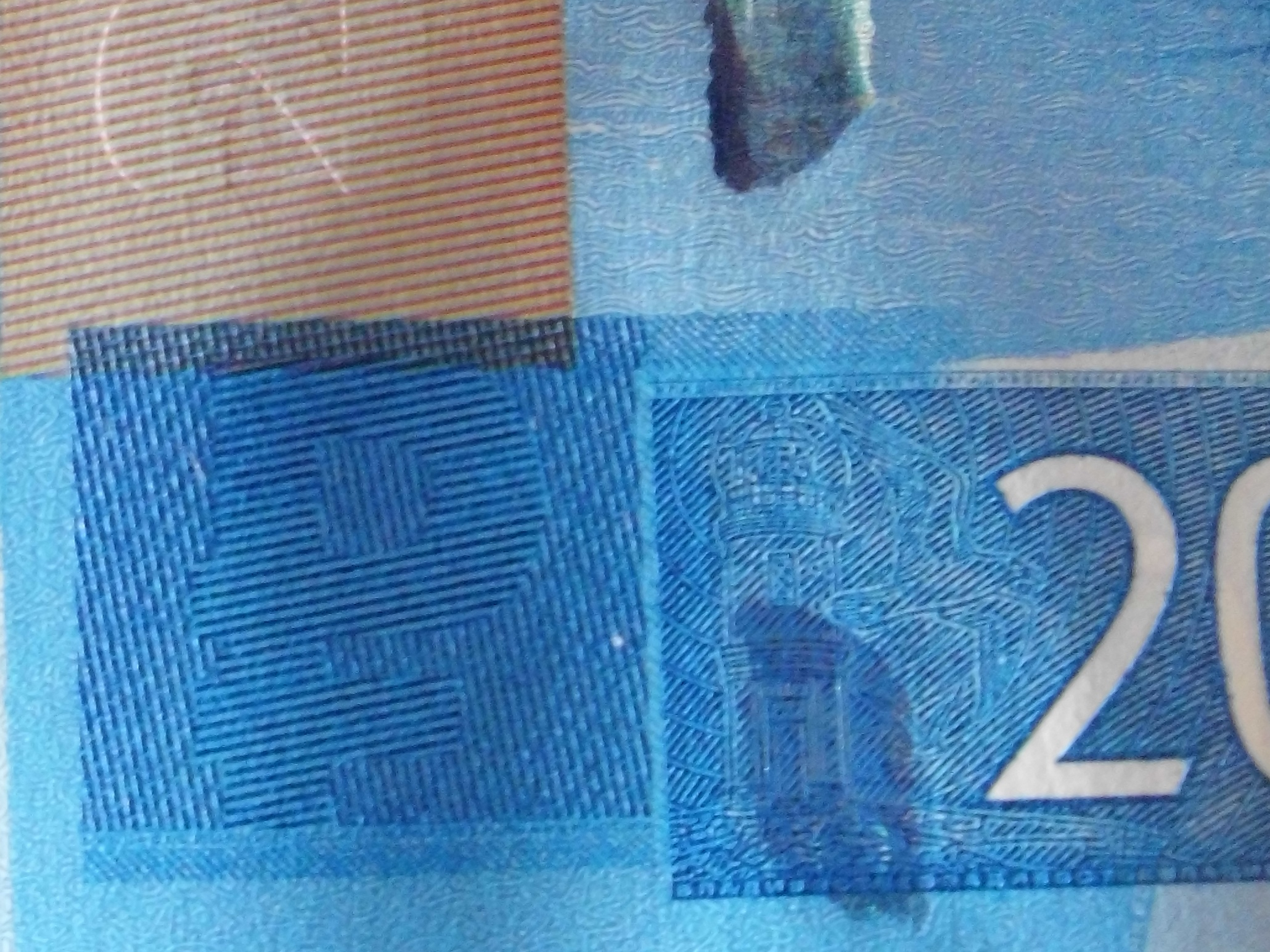 2000 российских рублей образца 2017 года. Аверс. Символ рубля с КИПП-эффектом. Вид под прямым углом.